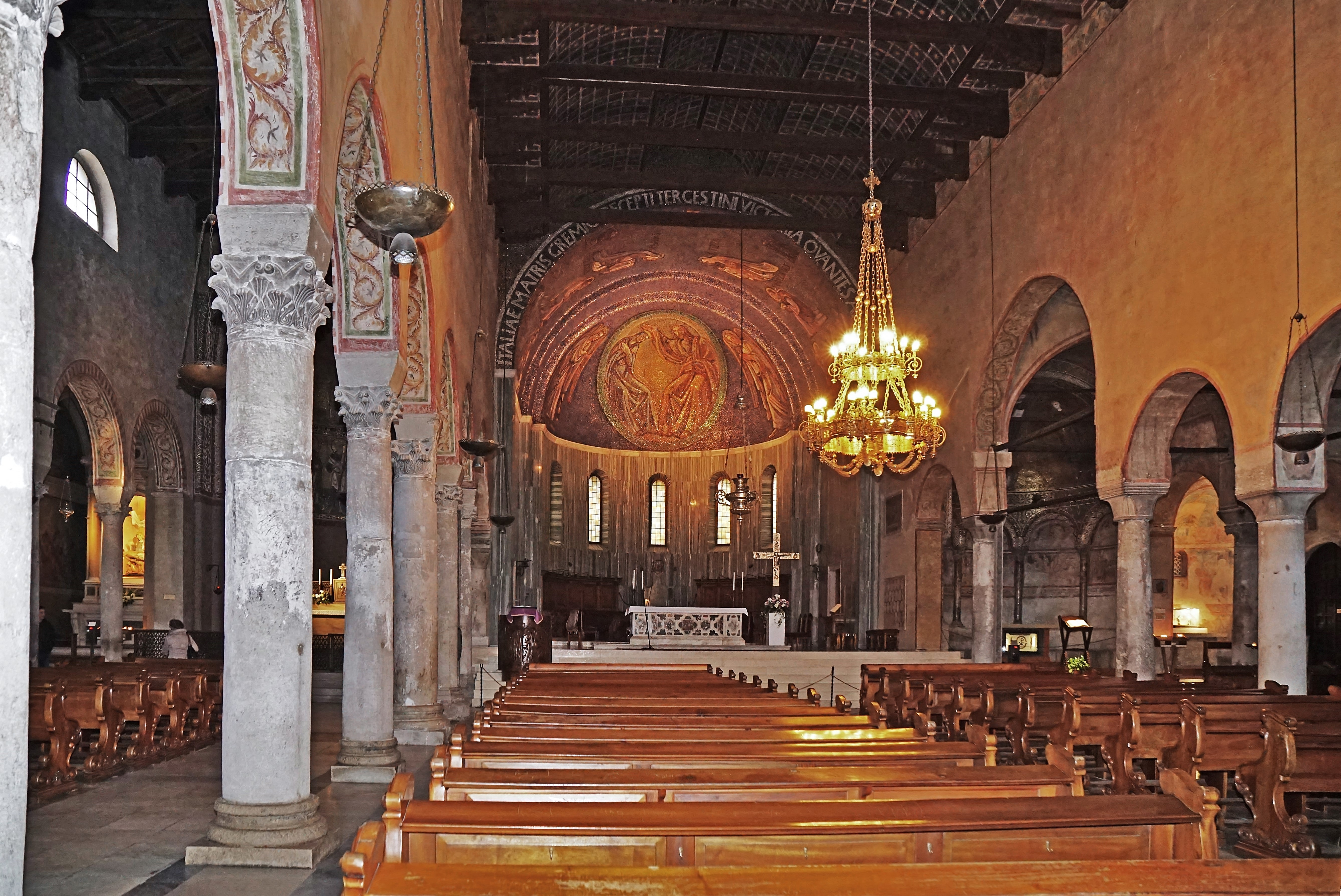 Innenansicht der Kathedrale San Giusto (Triest)